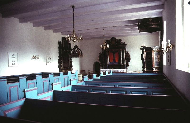 Resen Kirke, (Skive Kommune), kirkerummet